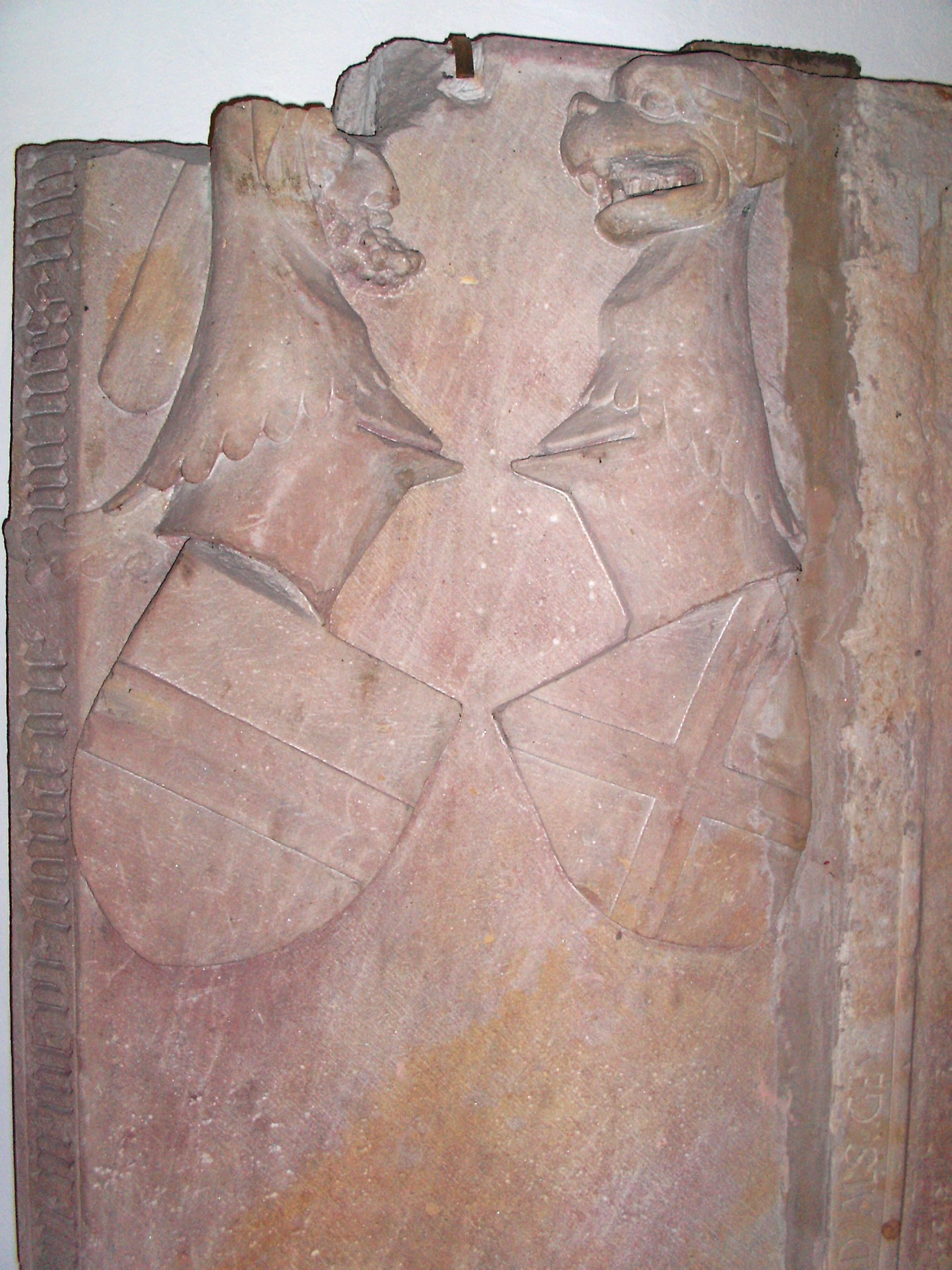 Wappen der Adelsfamilien Leuchtenberg (links) und Oettingen (rechts)